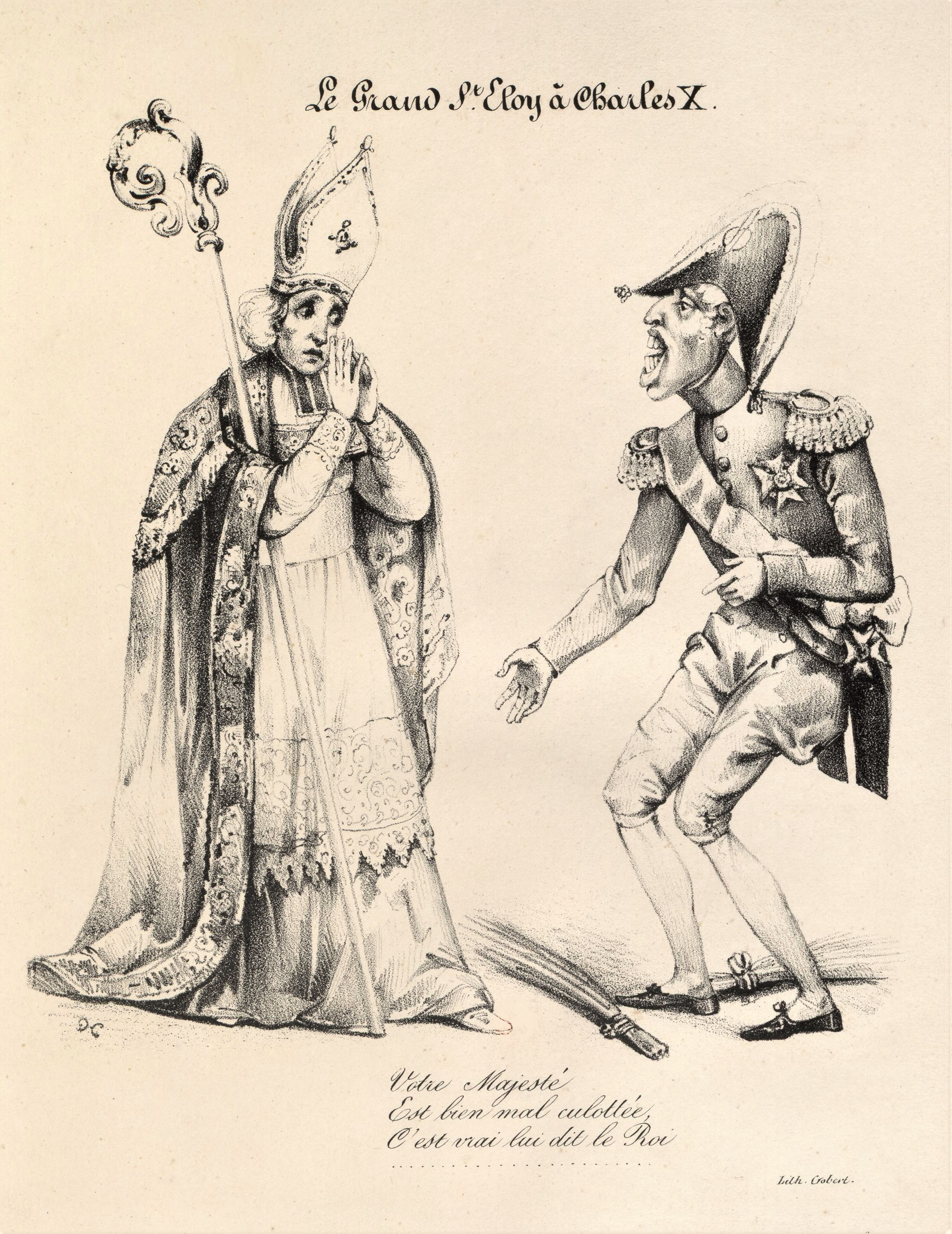 caricature.